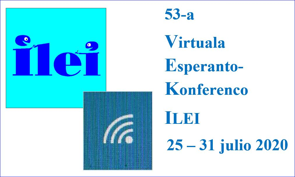 Logotipo de la 53-a Virtuala Esperanto-Konferenco ILEI 2020